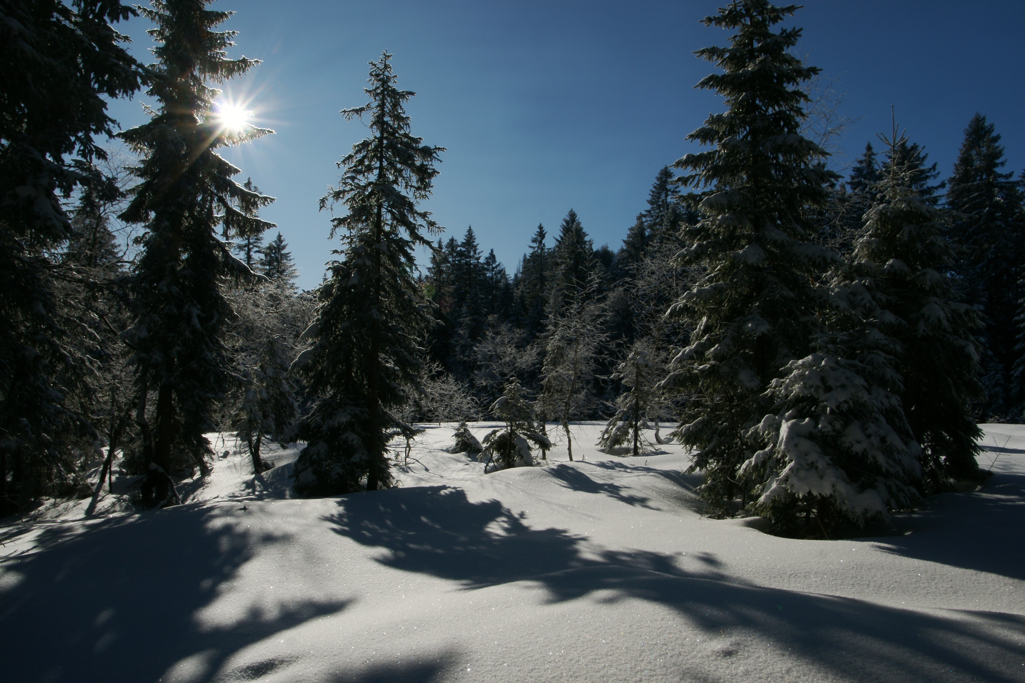 Die Gemeine Fichte (Picea abies) ist eine Pflanzenart in der Gattung der Fichten (Picea). Sie ist in Europa heimisch und der einzige in Mitteleuropa natürlich vorkommende Vertreter der Gattung. Fichtenwald auf Höhe der Hochälpelealpe in Schwarzenberg. Hier führt auf ca. 1.200 m der Weg vom Bödele vorbei zur Lustenauer Hütte.